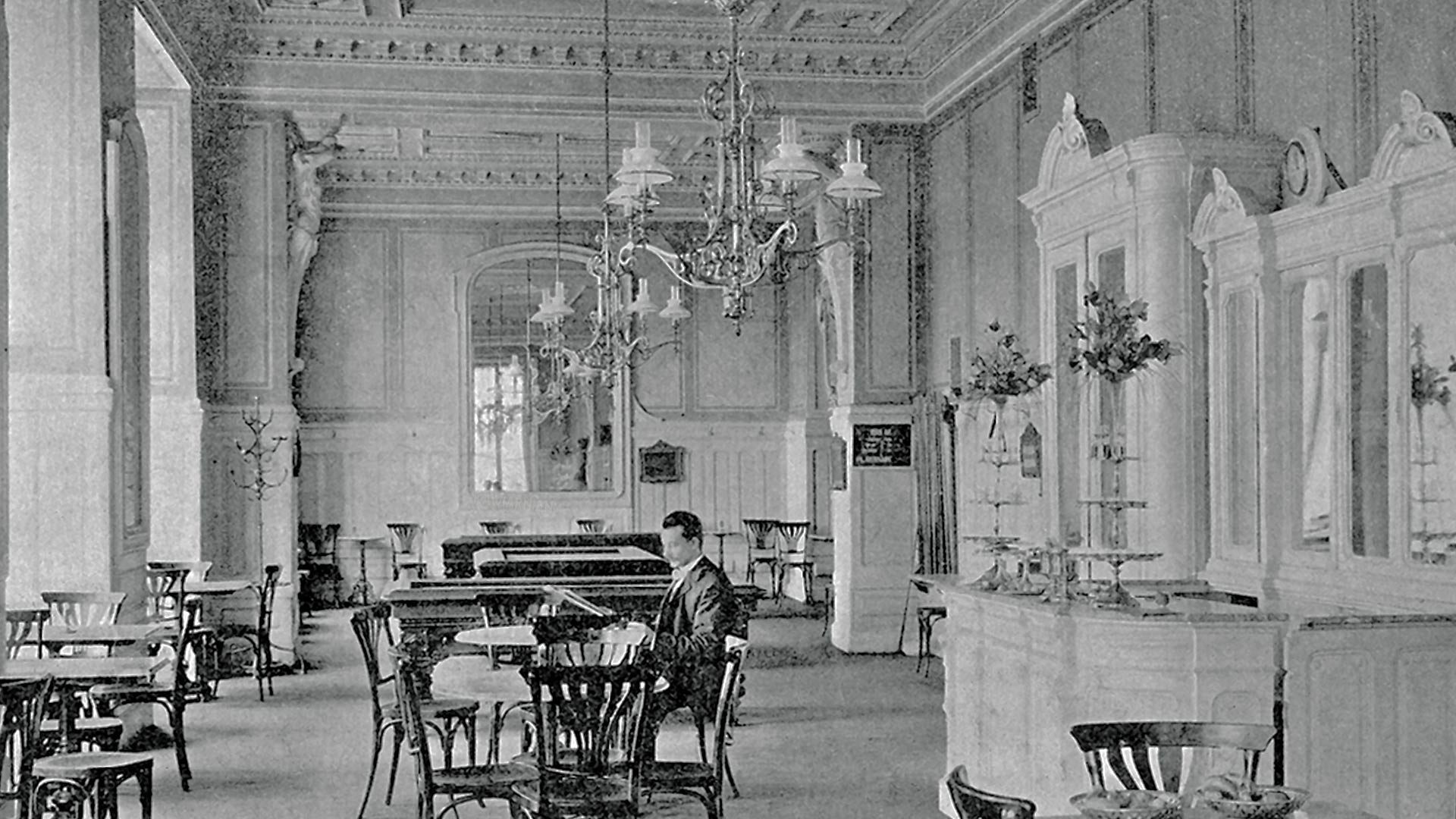 Львів